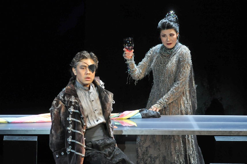 フリッカ役として出演 東京文化会館にて